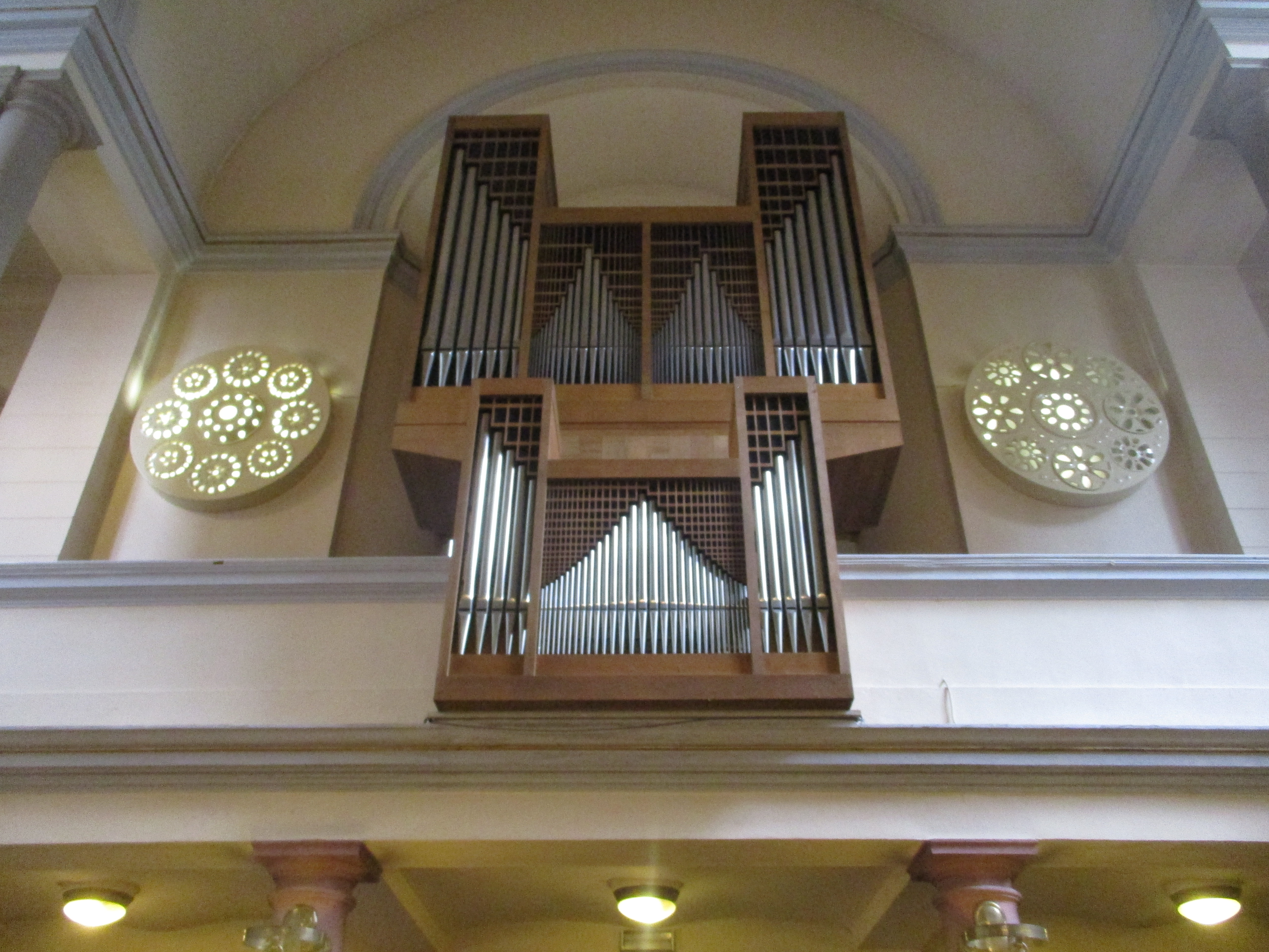 Evangelische Stadtkirche Frankfurt-Höchst, Hessen, Deutschland